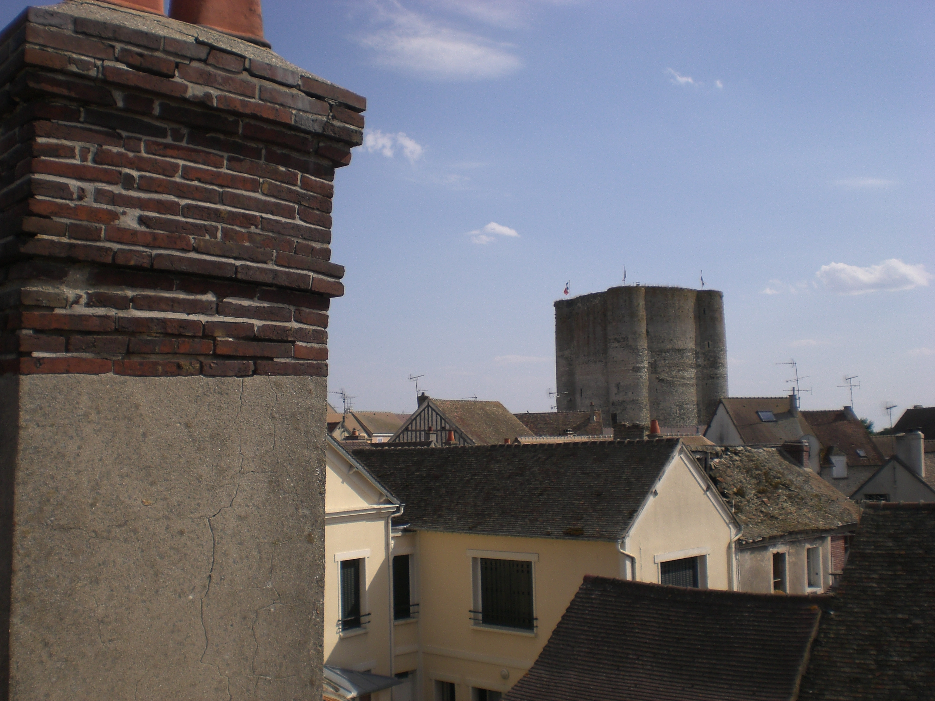 Donjon de Houdan (Yvelines, France)